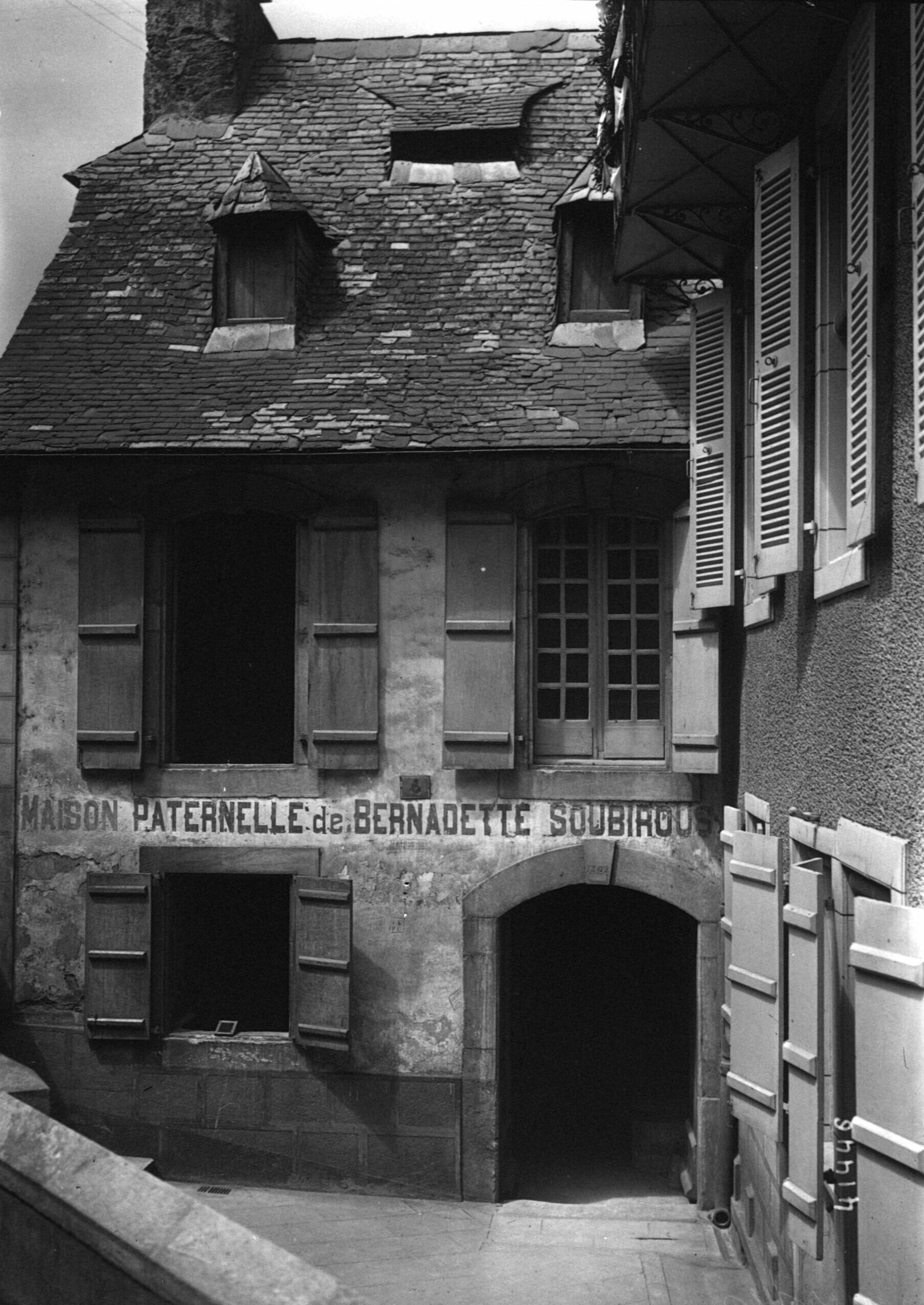 Maison paternelle de Bernadette Soubirous, moulin Lacadé, Lourdes